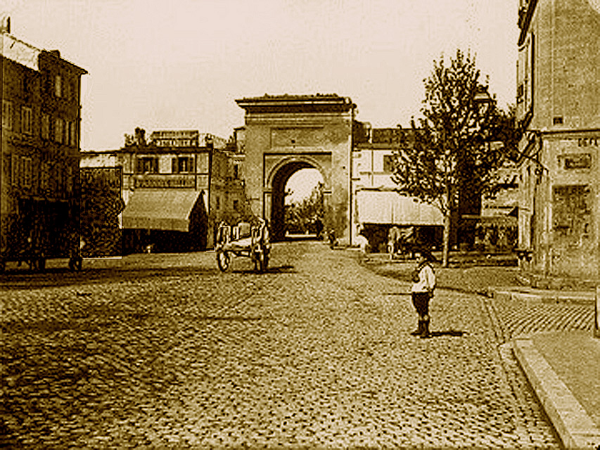 Place Crillon et porte de l'Oulle, photo prise avant 1900 date de la destruction de la porte construite par Jean-Baptiste Péru en 1786